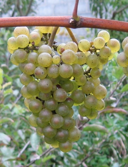 Hibernal - grono